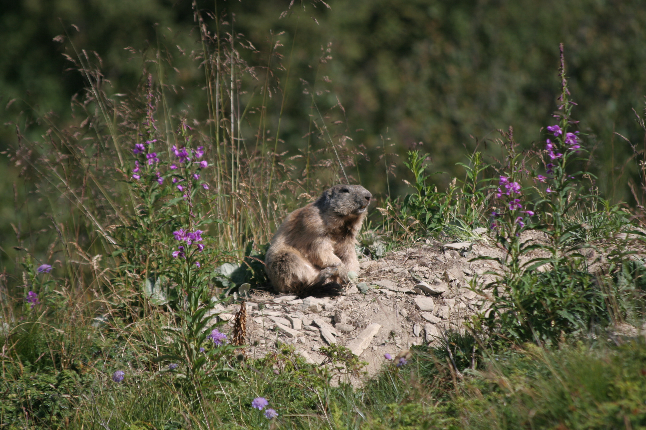 Marmotte en Savoie